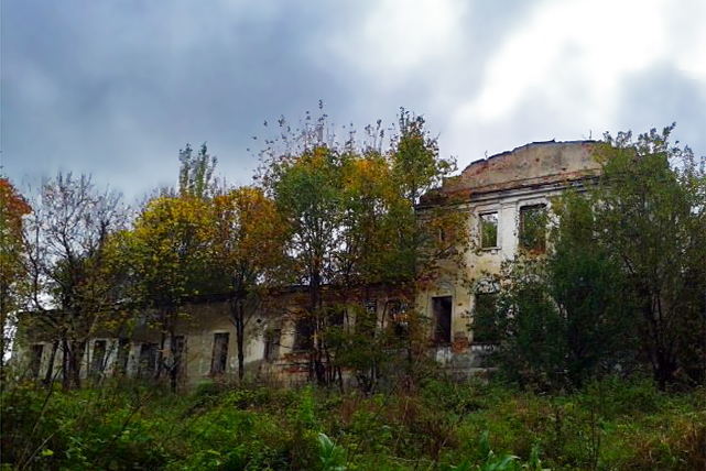 Усадьба Олениных (Максутовых) в поселке Крутоярский